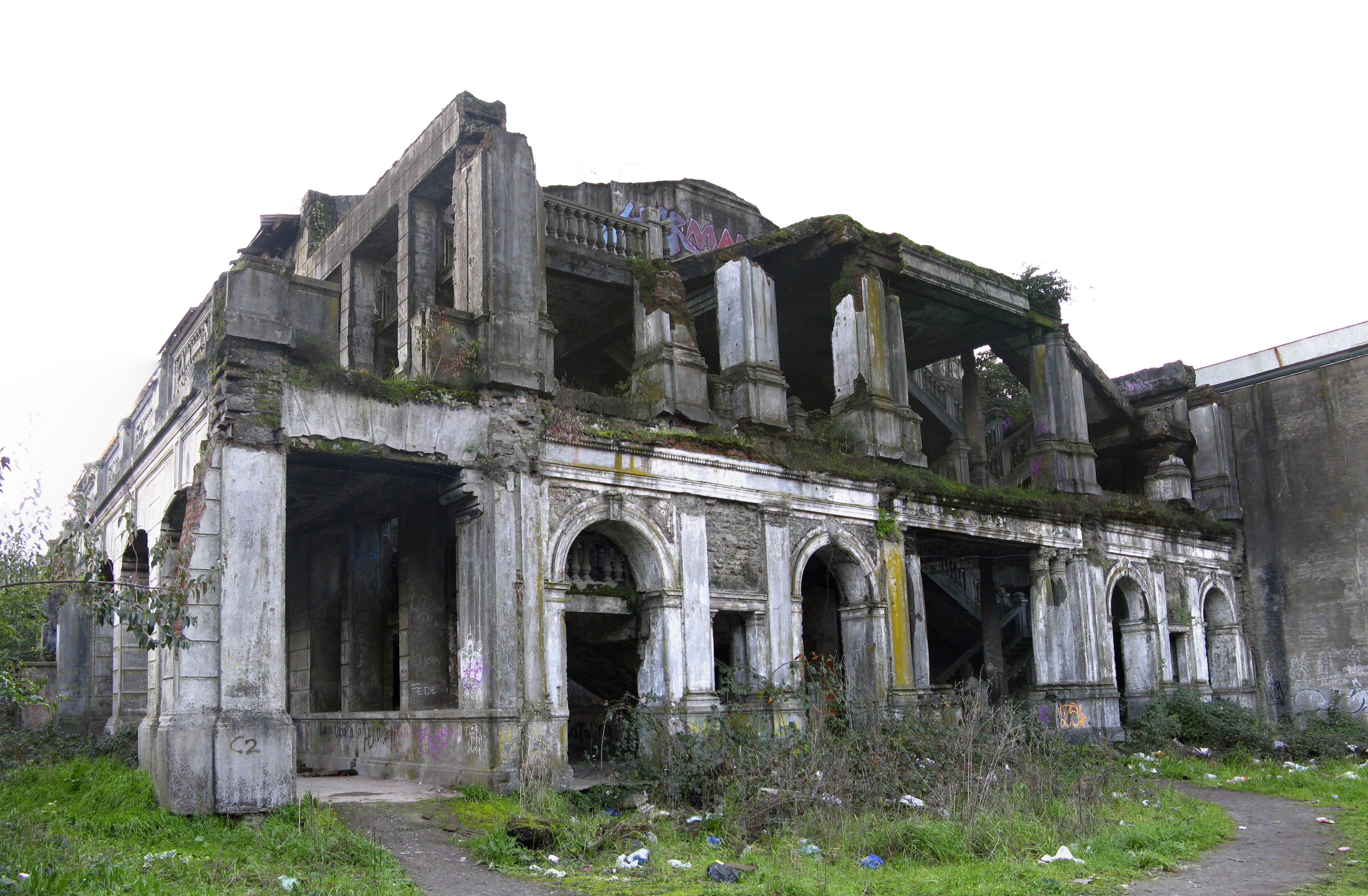 Antiguo Teatro Enrique Molina Concepción, Chile Julio de 2012 This is a photo of a national monument in Chile: 2100